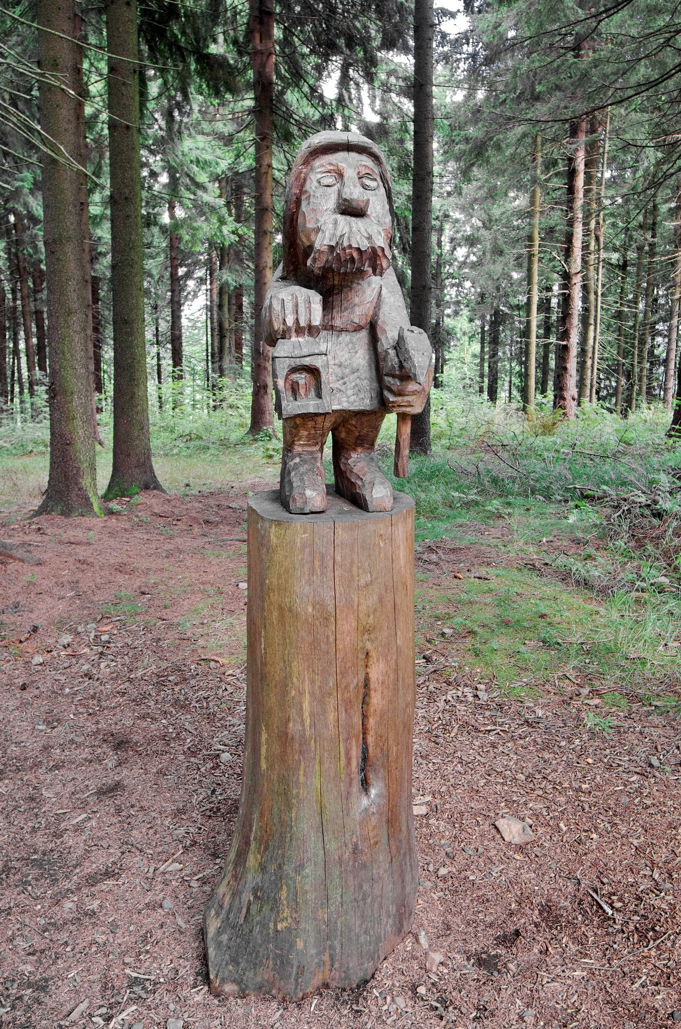 Plešivec, Krušné hory, Stezka krušnohorských pověstí - permoník Perkmon, okres Karlovy Vary